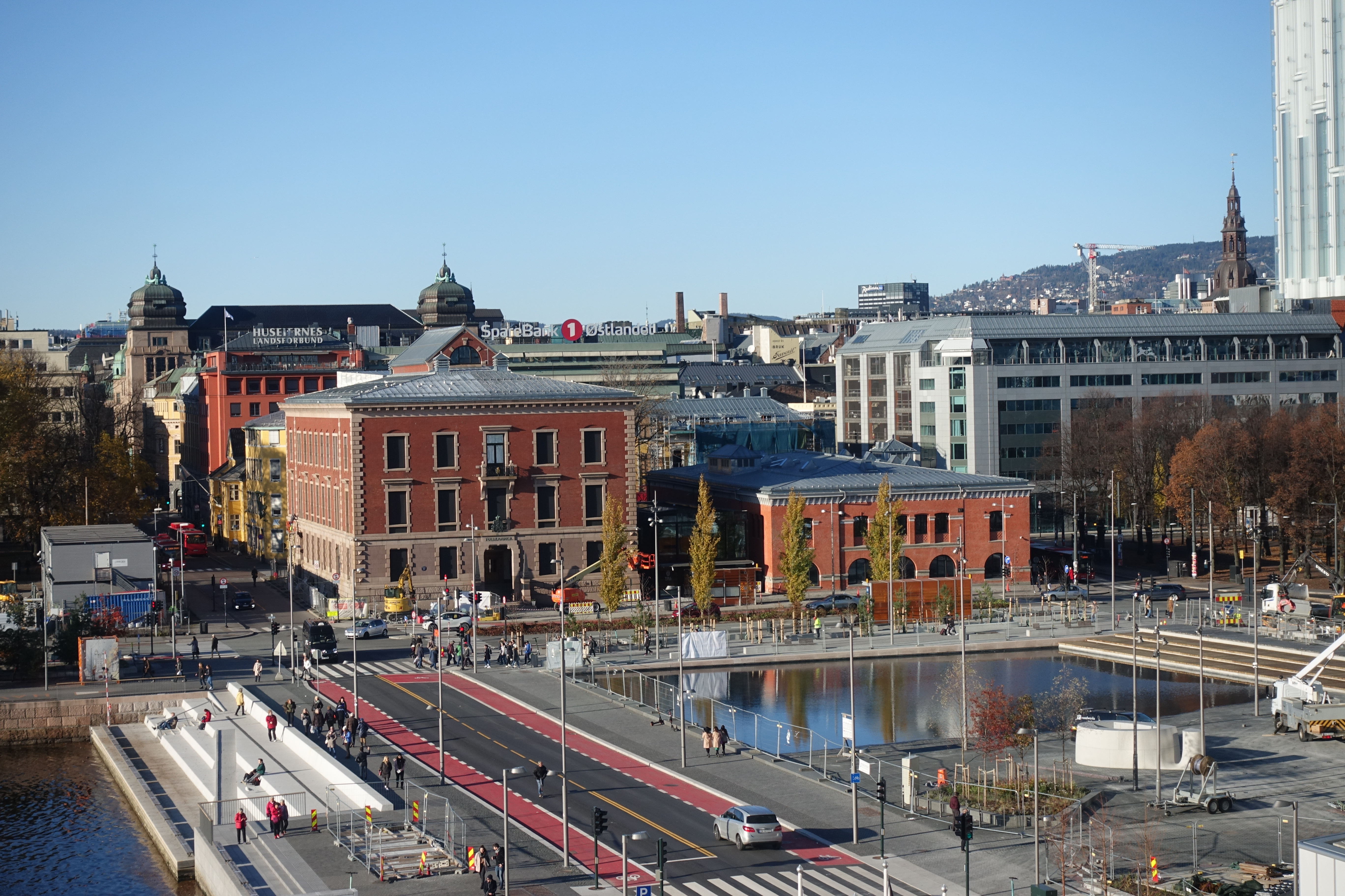 Tolletatens hovedkontor i Oslo sentrum.